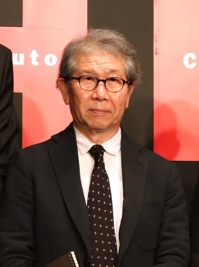 (De izquierda a derecha) Gonzalo de Benito, Embajador de España en Japón, Leonardo Carrión Eguiguren, Embajador de Ecuador en Japón, André Corrêa do Lago, Embajador de Brasil en Japón, Riken Yamamoto, arquitecto, Seiko Luis Ishikawa, Embajador de Venezuela en Japón, Antonio Gil de Carrasco, director del Instituto Cervantes de Tokio, y Alejandro Posada, Encargador de negocio de la Embajada de Colombia en Japón.